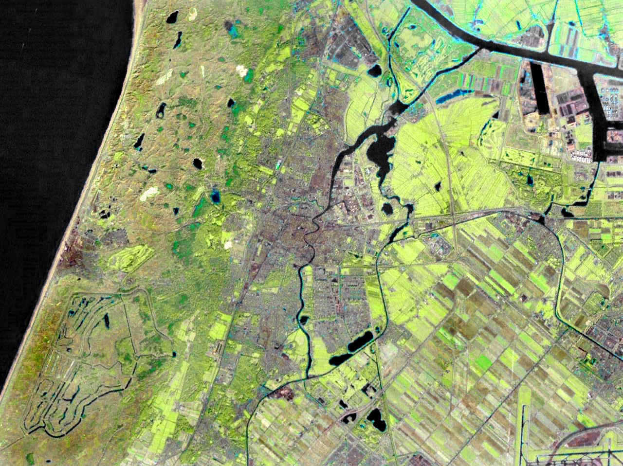 Als wiki afbeelding: Haarlem 4.64219E 52.38169N.jpg. Contrast verbeterd Ed Stevenhagen 13 jul 2005 11:05 (CEST) Haarlem, The Netherlands This is a NASA World Wind screenshot. This image is in the public domain because it contains materials that originally came from NASA and works created by the U.S. federal government cannot be copyrighted. Exception is the usage-restricted NASA logo. See the NASA copyright policy for more information.